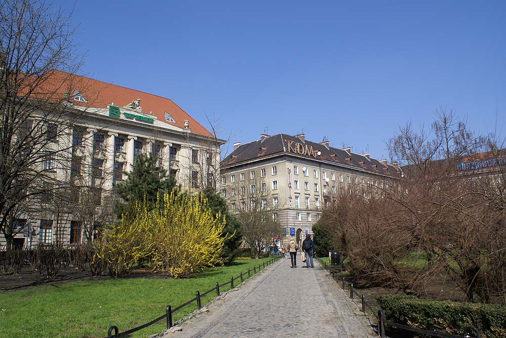 Założenie urbanistyczne plac Kościuszki (w gr. dz. AM-33 nr 2,56,57,58; AM-35 nr 1,8,9,10,11,12; AM-37 nr 37/17, linii zabudowy: pl. Kościuszki, ul. Kościuszki do skrzyżowania z ul. Czystą i z ul. Bałuckiego oraz ul. Świdnicką na odcinku od skrzyżowania z ul. Piłsudskiego do skrzyżowania z ul. Podwale. pl. Kościuszki, Miasto Wrocław - Stare Miasto